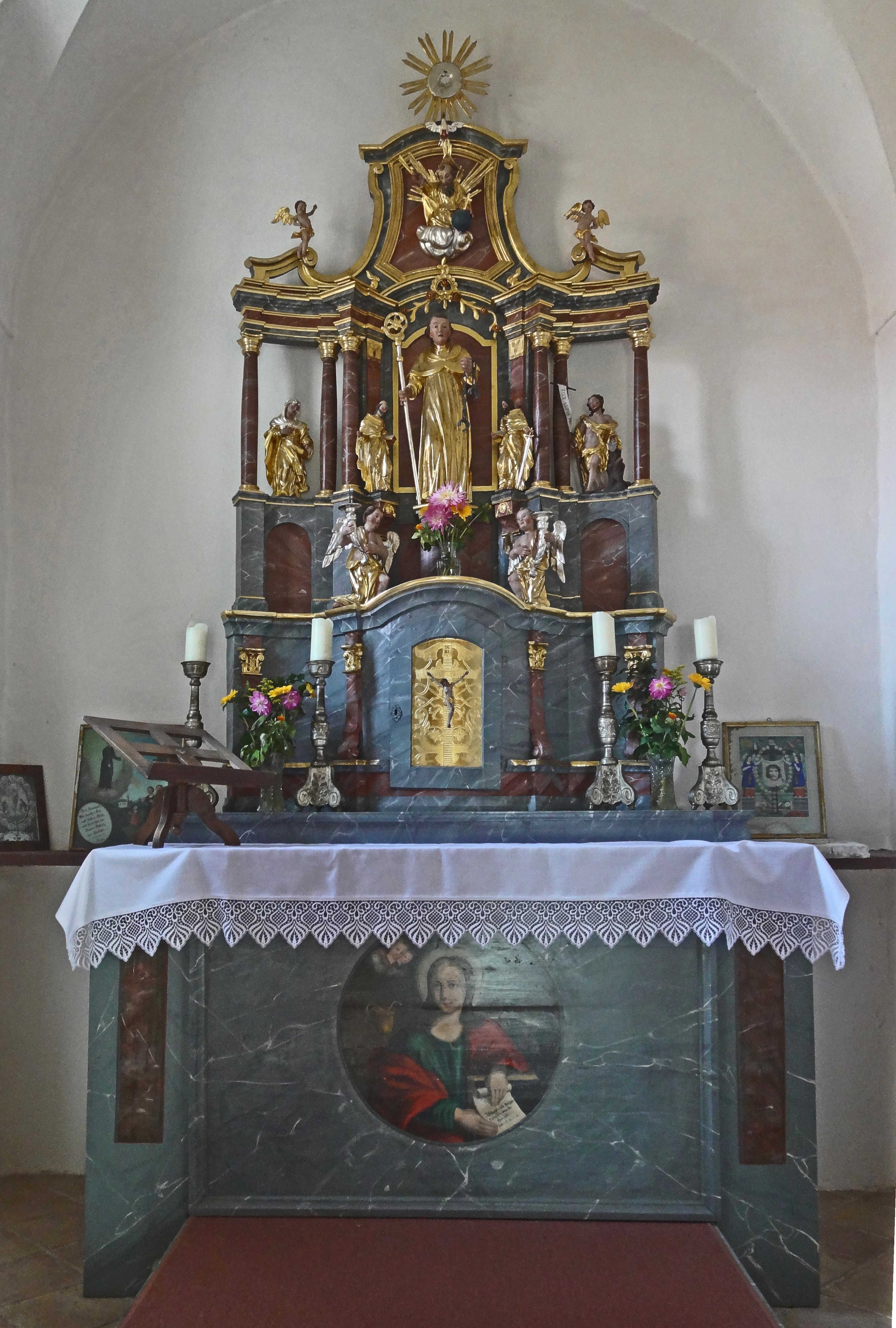 Kath. Filialkirche Hl. Leonhard, Stocklitz (Feldkirchen in Kärnten). Der Hochaltar